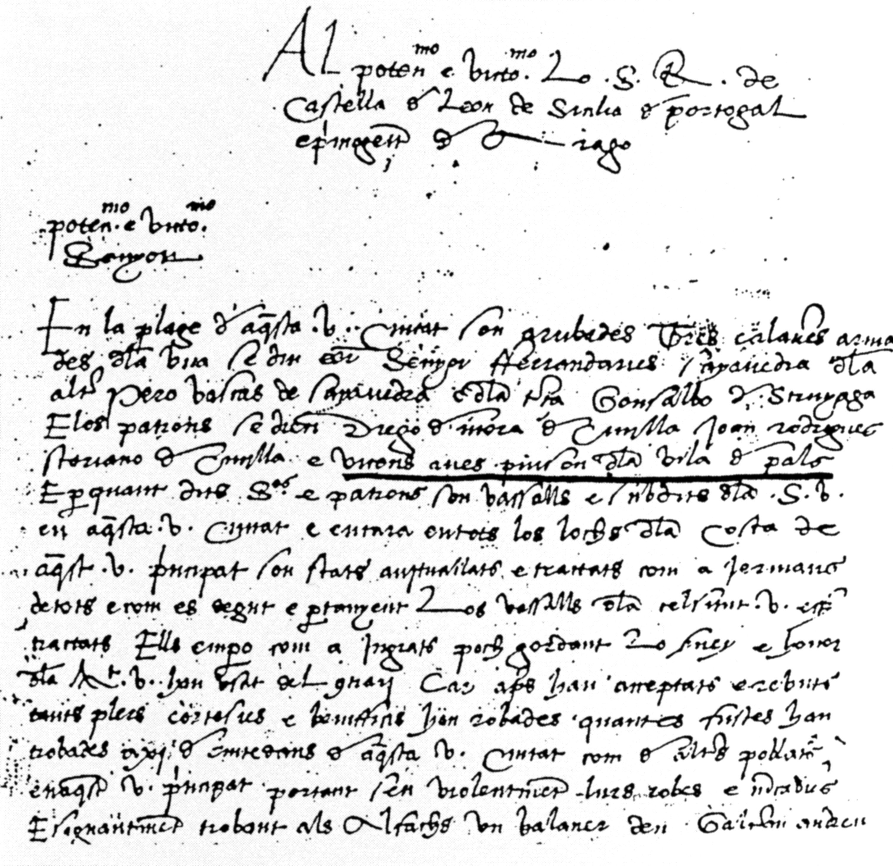 Carta dels Consellers de Barcelona al aleshores Príncep Ferran coneguda entre els historiadors catalans com "avis d'un corsari anomenat Vicens Anes Pinçon, de Pals" donant informació del atac de l'esmentat corsari a la ciutat de Barcelona